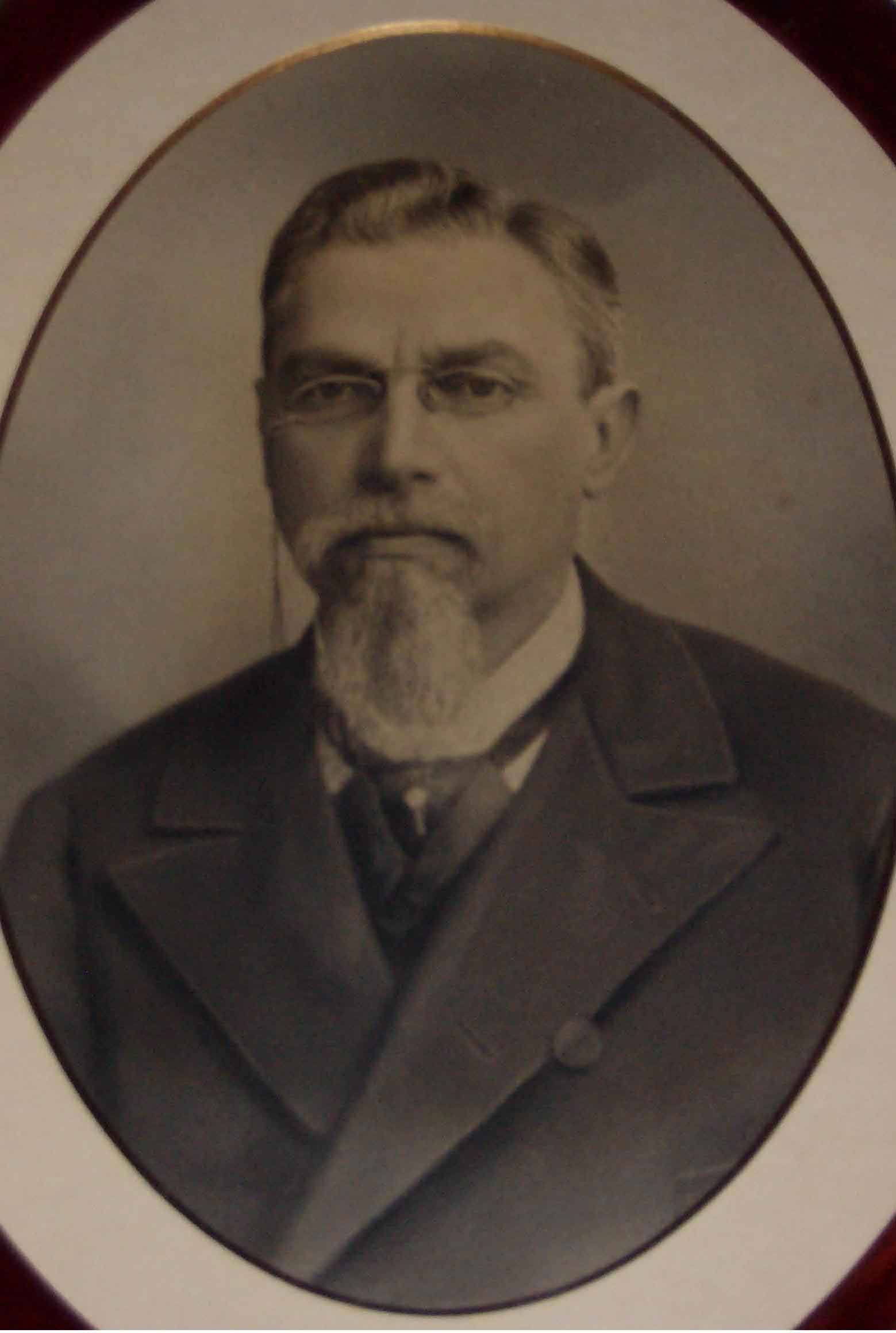 Pessoa trajando sobrecasaca